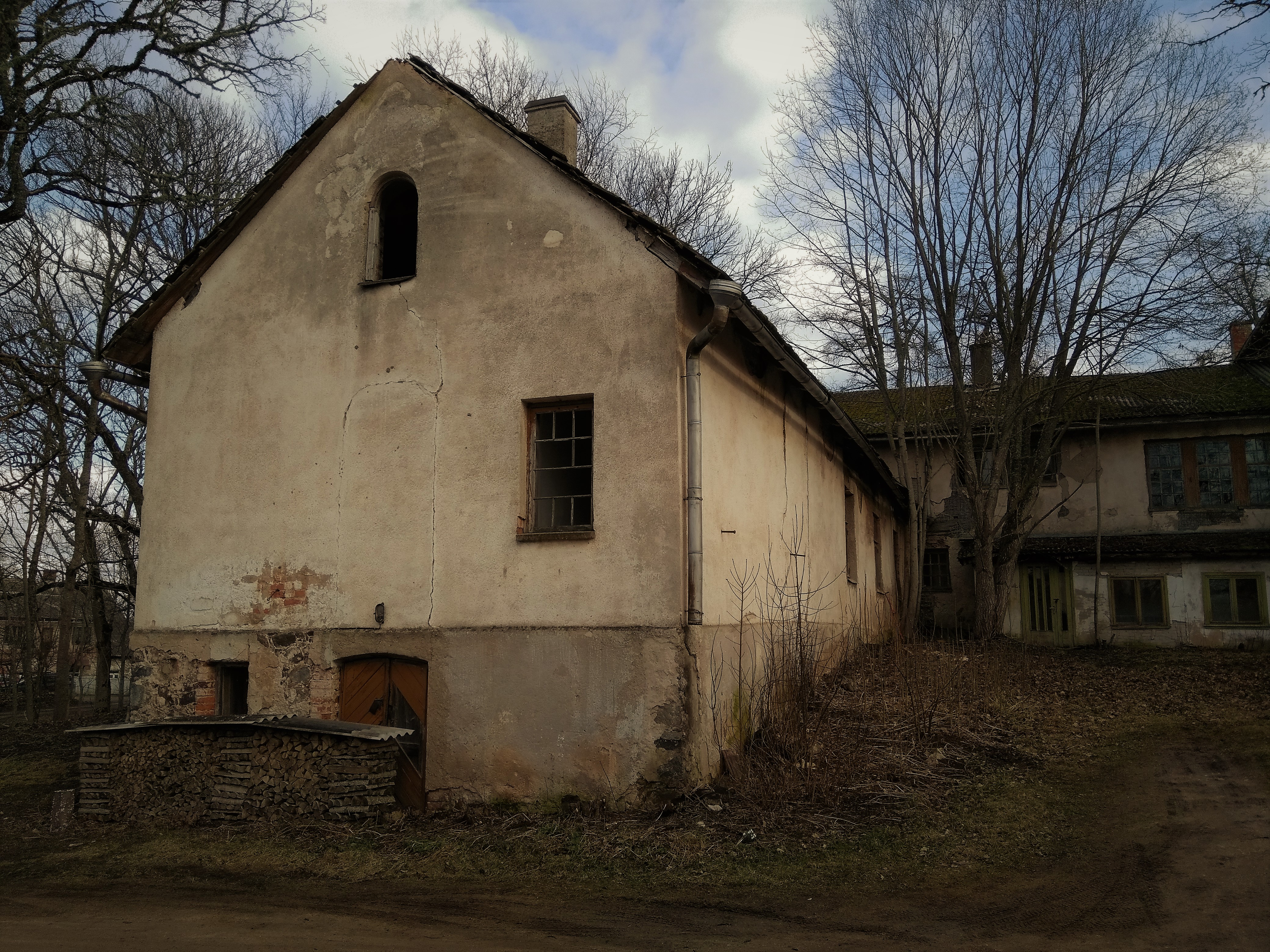 Vaade linnuseala põhjavallil seisvale majandus-abihoonele läänest. Omapärase küllaltki kitsa hoone all on ebakorrapärase kitsa silindervõlviga kelder. Paremale jääb kunagine linnuseõu.